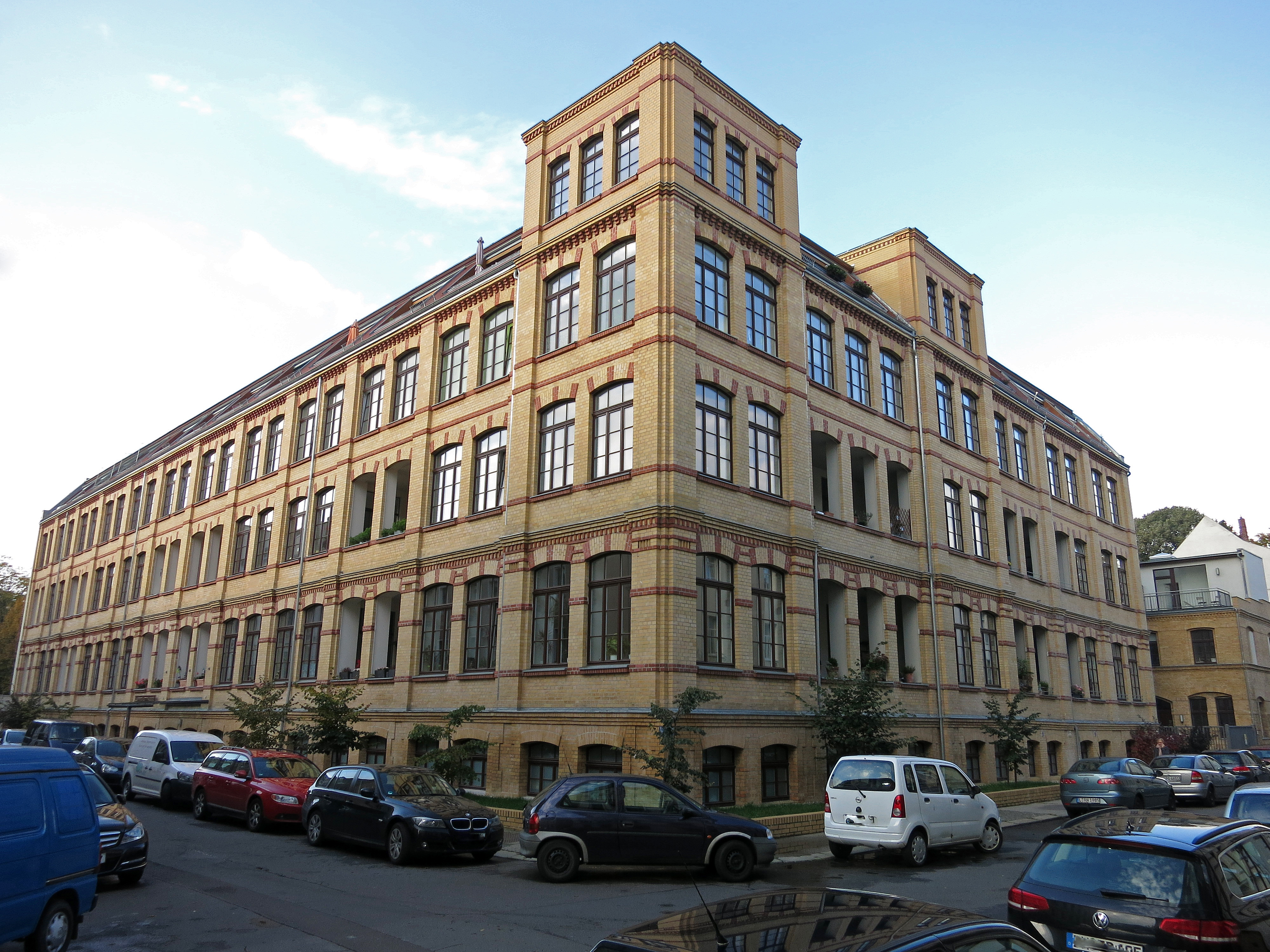 Das 2012 sanierte Gebäude der ehem. Moritz Mädler Koffer- und Lederwarenfabrik, erbaut 1886, Luppenstraße 1, Leipzig-Lindenau, jetzige Nutzung als Mehrfamilienwohnanlage.